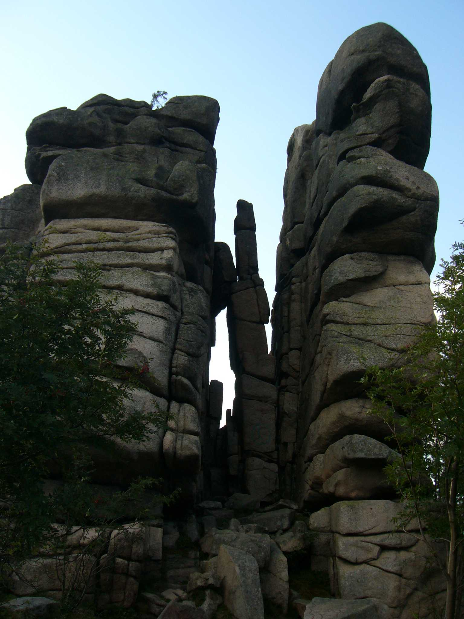 Wahadło - centralna grupa Kukułczych Skał w Karkonoszach